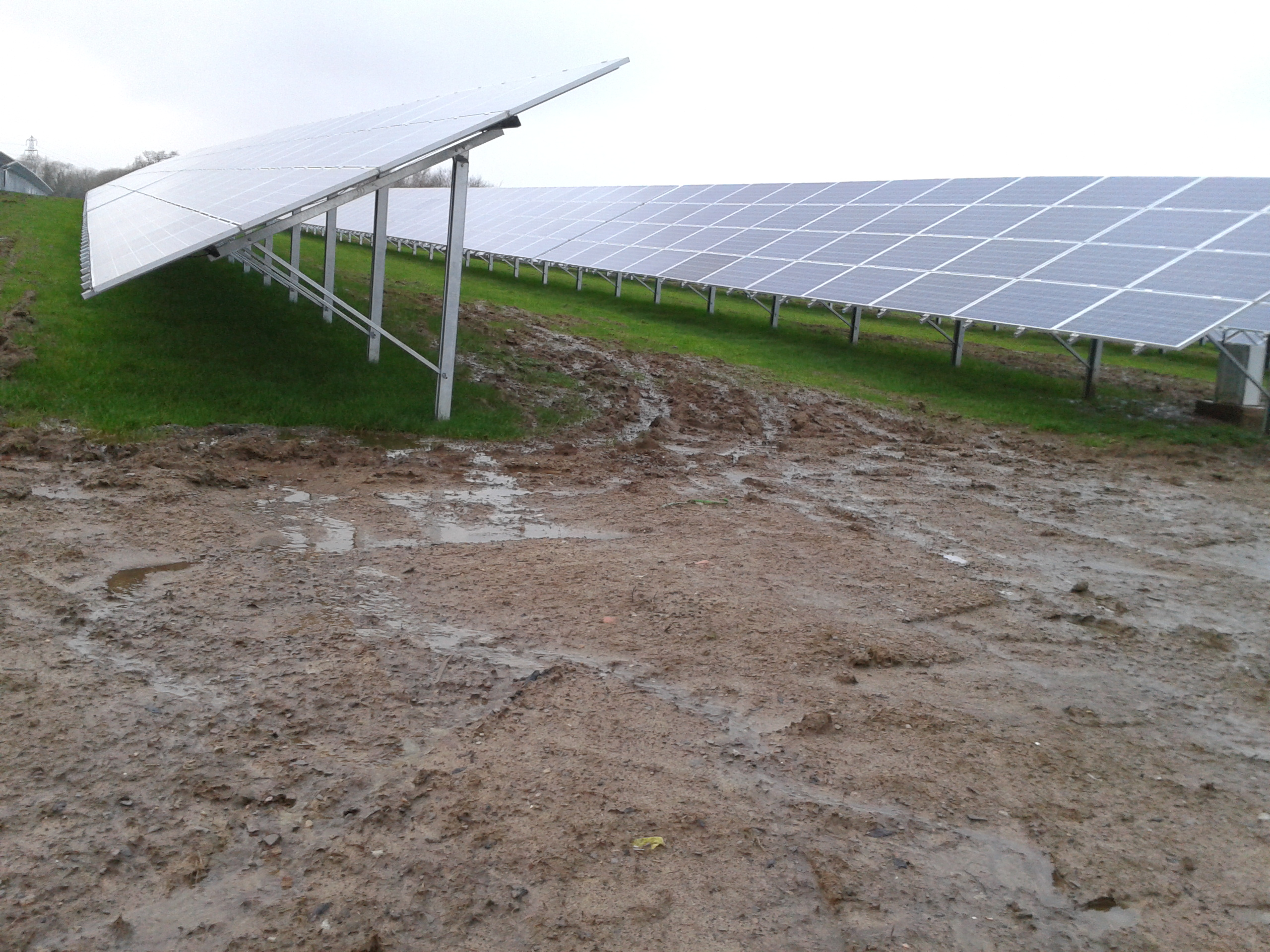 Solar Farm